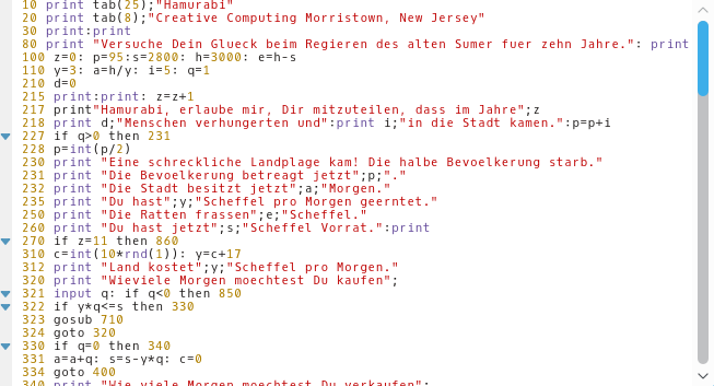 Teile des Programmausdrucks des Spiels Hamurabi in Vintage BASIC im Text-Editor Kate